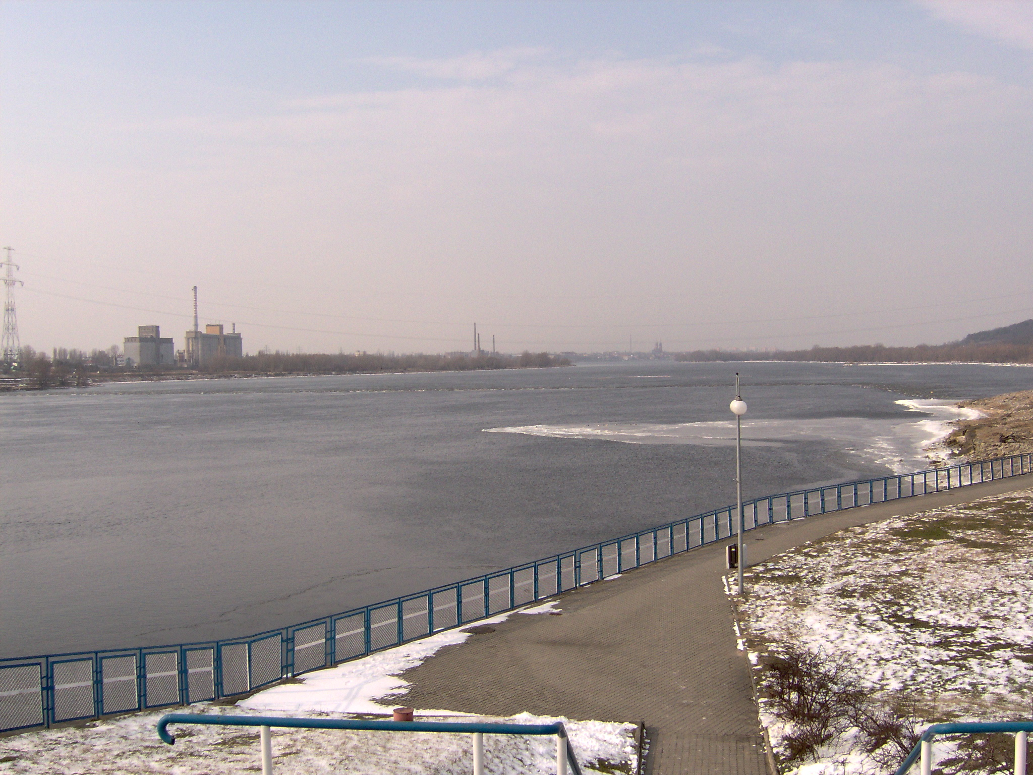 Zapora wodna na Wiśle i okolice (2007 r.)